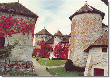 Vue de la cour intérieure du château de Thorens. Photo de Robert Pellet pour la famille de Roussy de Sales